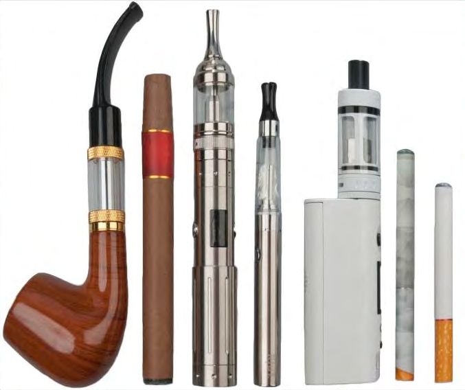 Diferentes modelos de ecigs